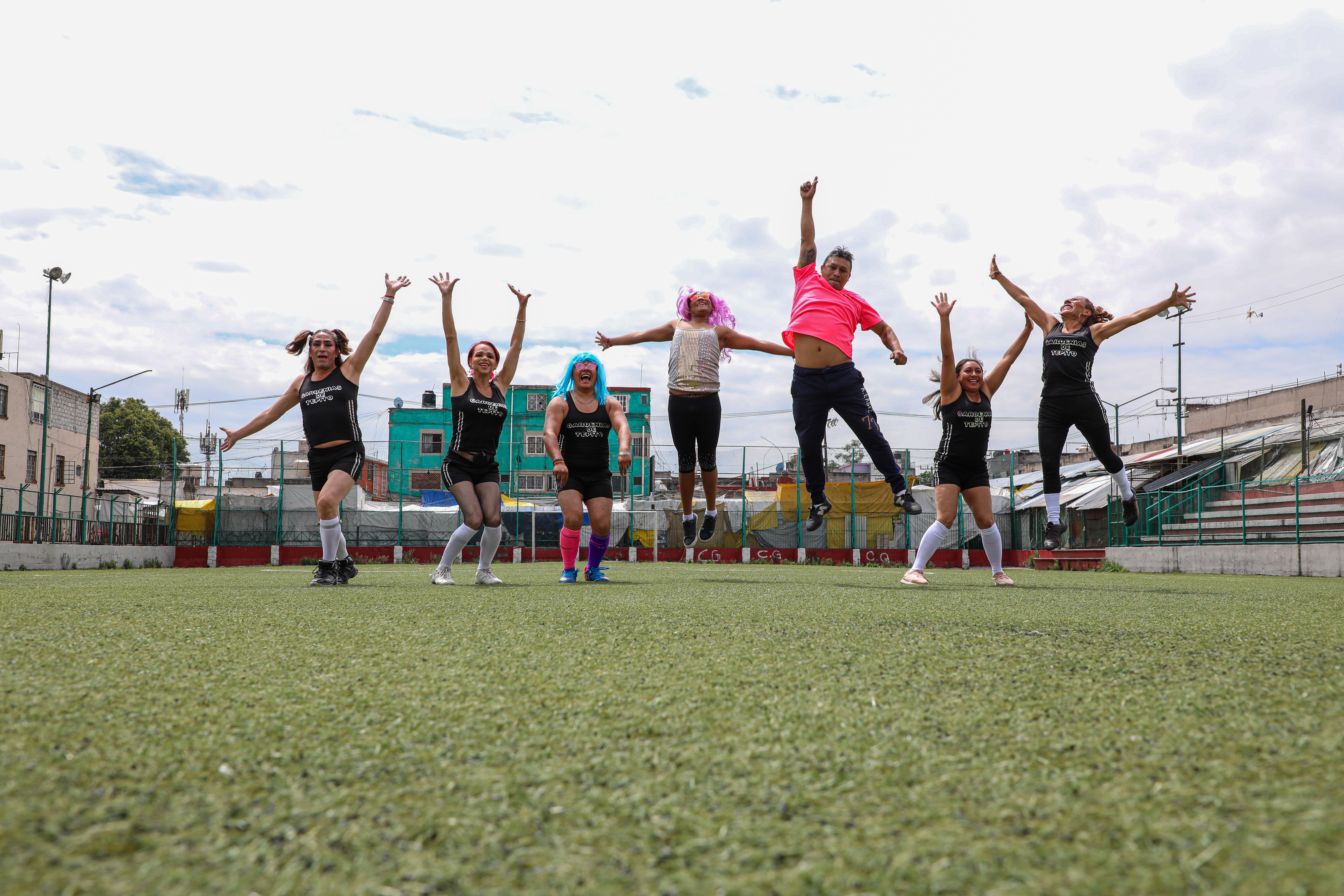 Foto grupal de las Gardenias de Tepito.